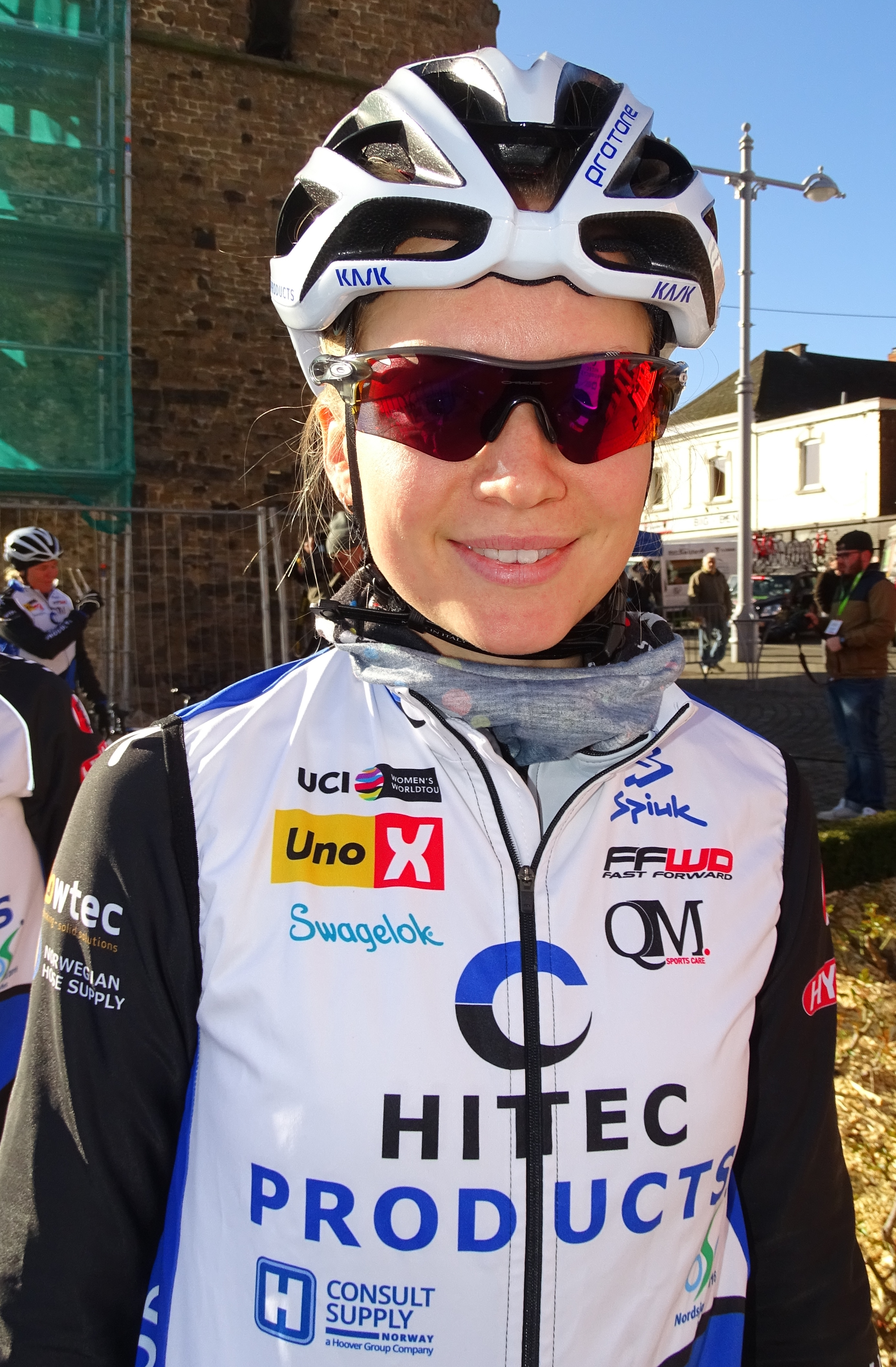 Reportage réalisé le mercredi 2 mars à l'occasion du départ du Samyn des Dames 2016 et du Samyn 2016 à Quaregnon, Belgique.